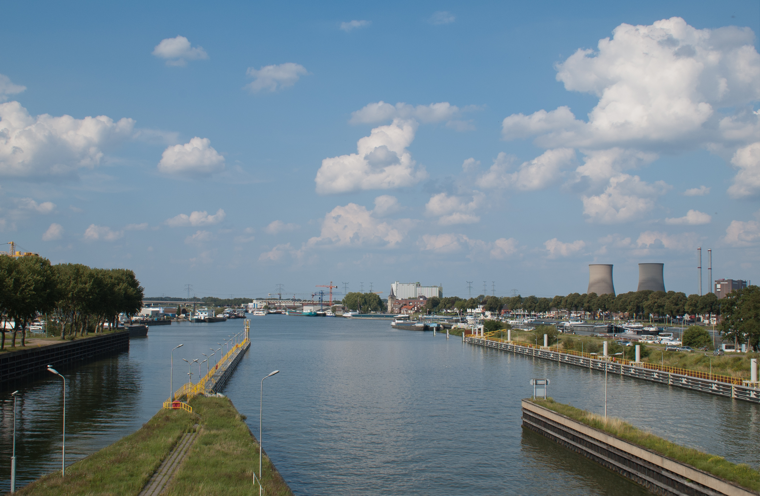 Blick über den Hafen und den Ort Maasbracht, Niederlande, gesehen von der Schleuse Maasbracht des Julianakanals aus. Im Hintergrund rechts das Gaskraftwerk Clauscentrale.